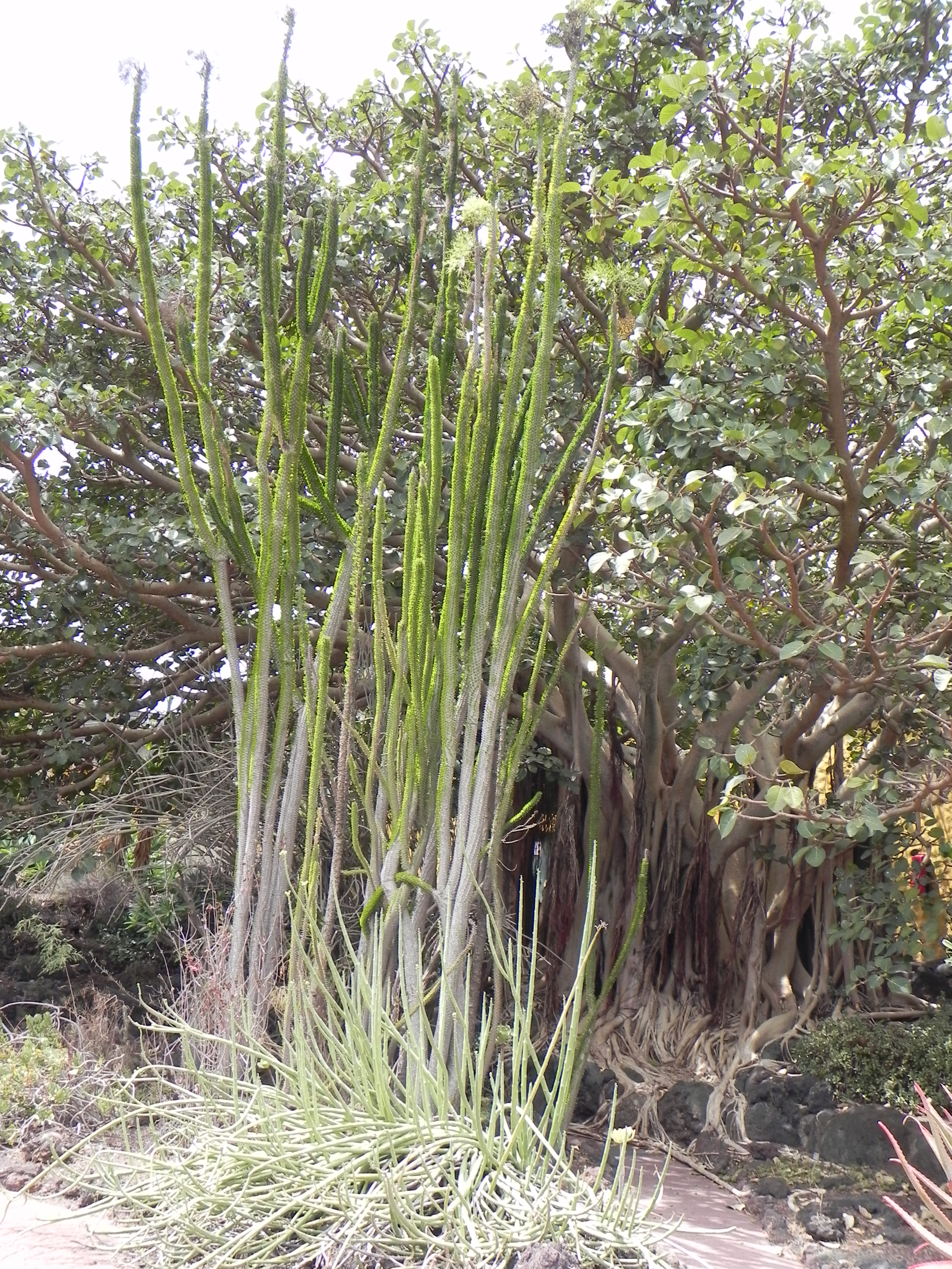 Alluaudia ascendens ở Jardín Botánico Canario 2018